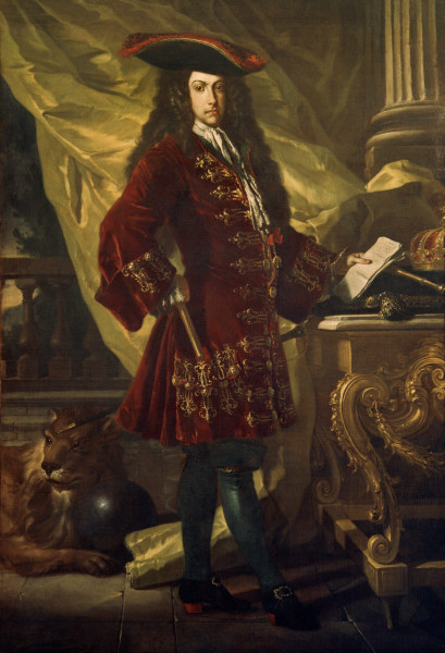 Ritratto dell'Arciduca Carlo d'Asburgo come Carlo III di Spagna